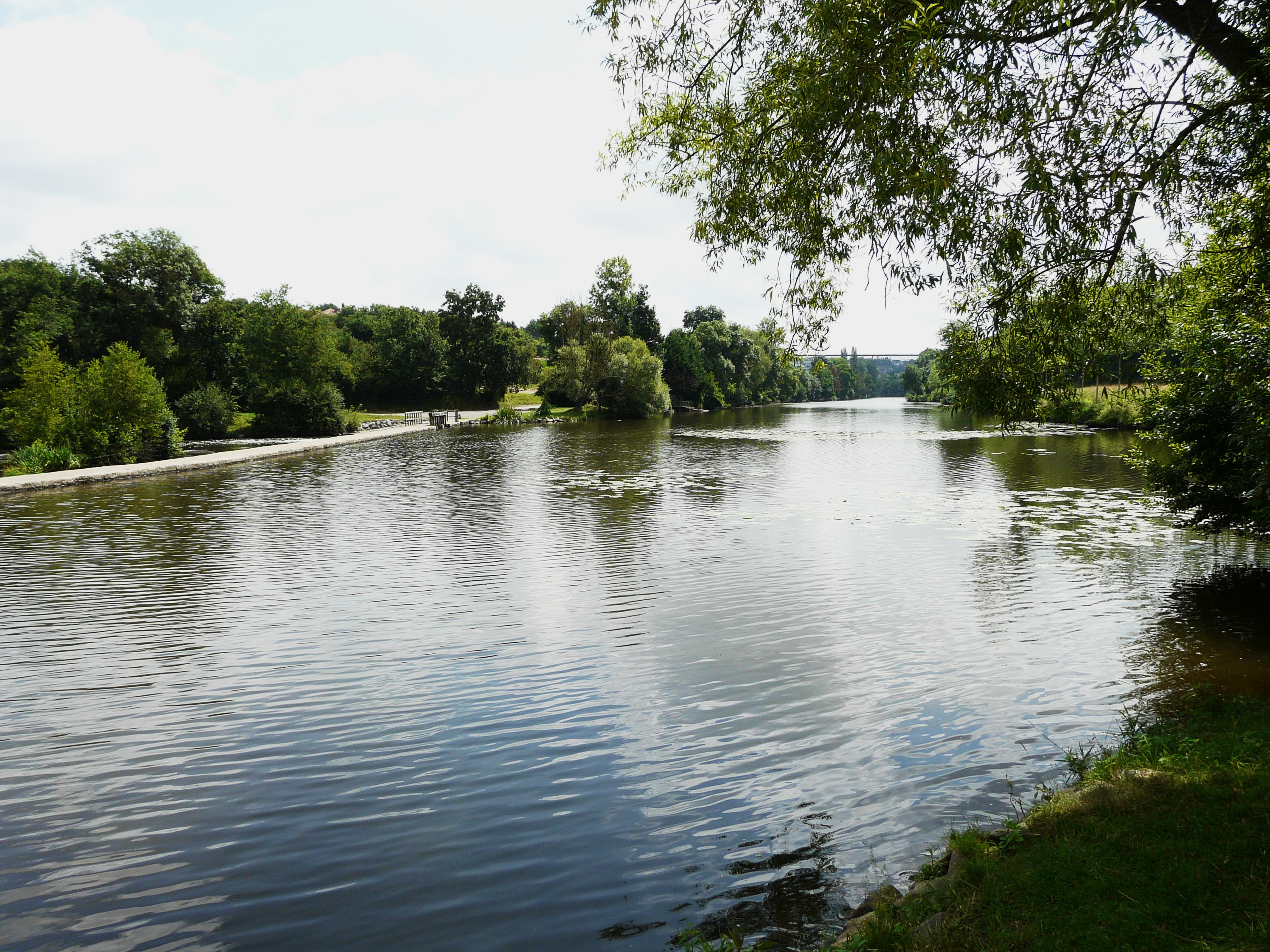 Franchissant le Thouet, la chaussée de Pommiers à Sainte-Radegonde